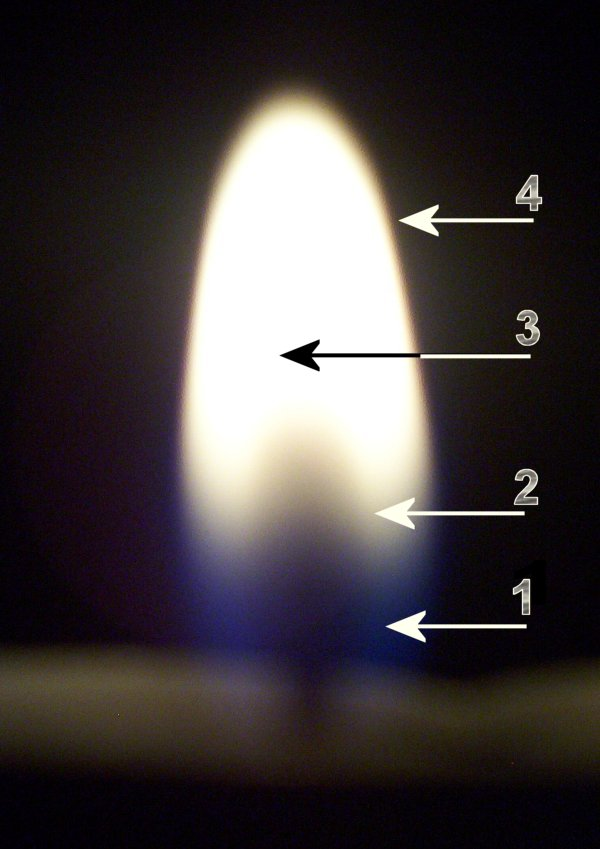 Eigen foto, gebruik onder GFDL